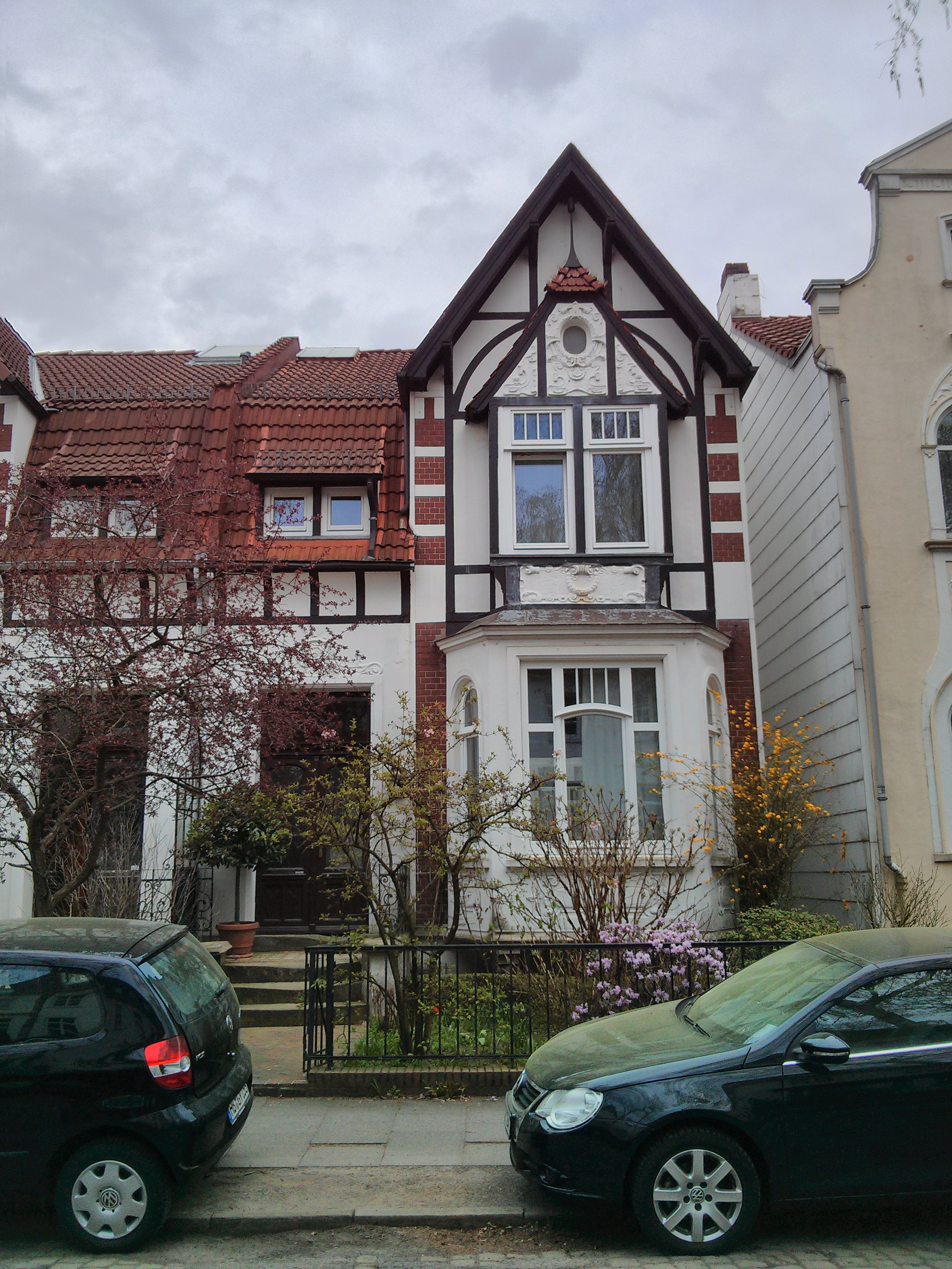 Wohnhaus in Bremen, Lortzingstraße 1C Das abgebildete Objekt ist ein geschütztes Kulturdenkmal in der Freien Hansestadt Bremen, mit der Nr. 0845 beim Landesamt für Denkmalpflege registriert.